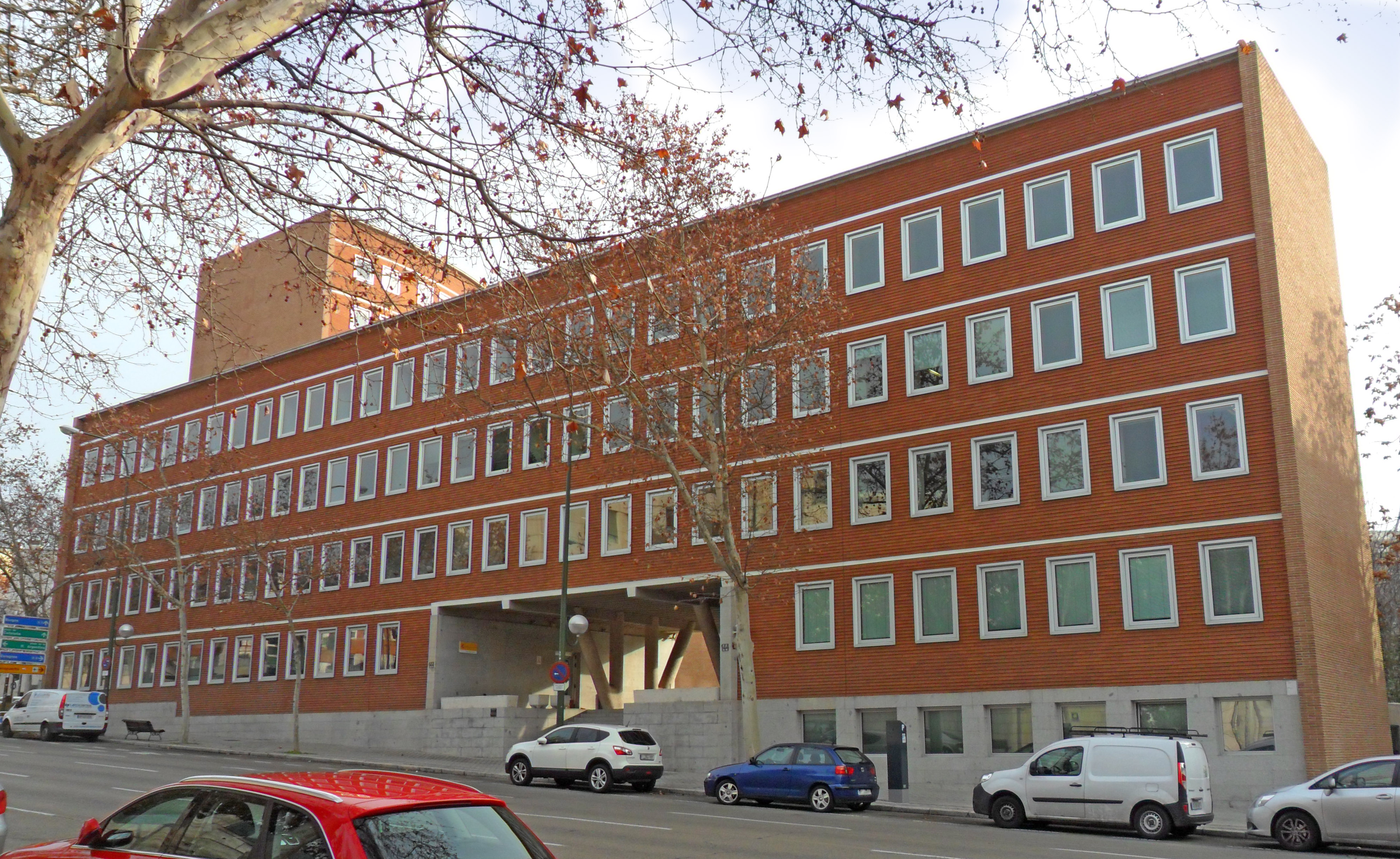 Sede de la Secretaría General de Pesca del Ministerio de Agricultura, Alimentación y Medio Ambiente de España, en el nº 144 de la Calle de Velázquez de Madrid, en el distrito de Chamartín. El edificio fue proyectado en 1951 por Miguel Fisac y construido de 1953 a 1956.